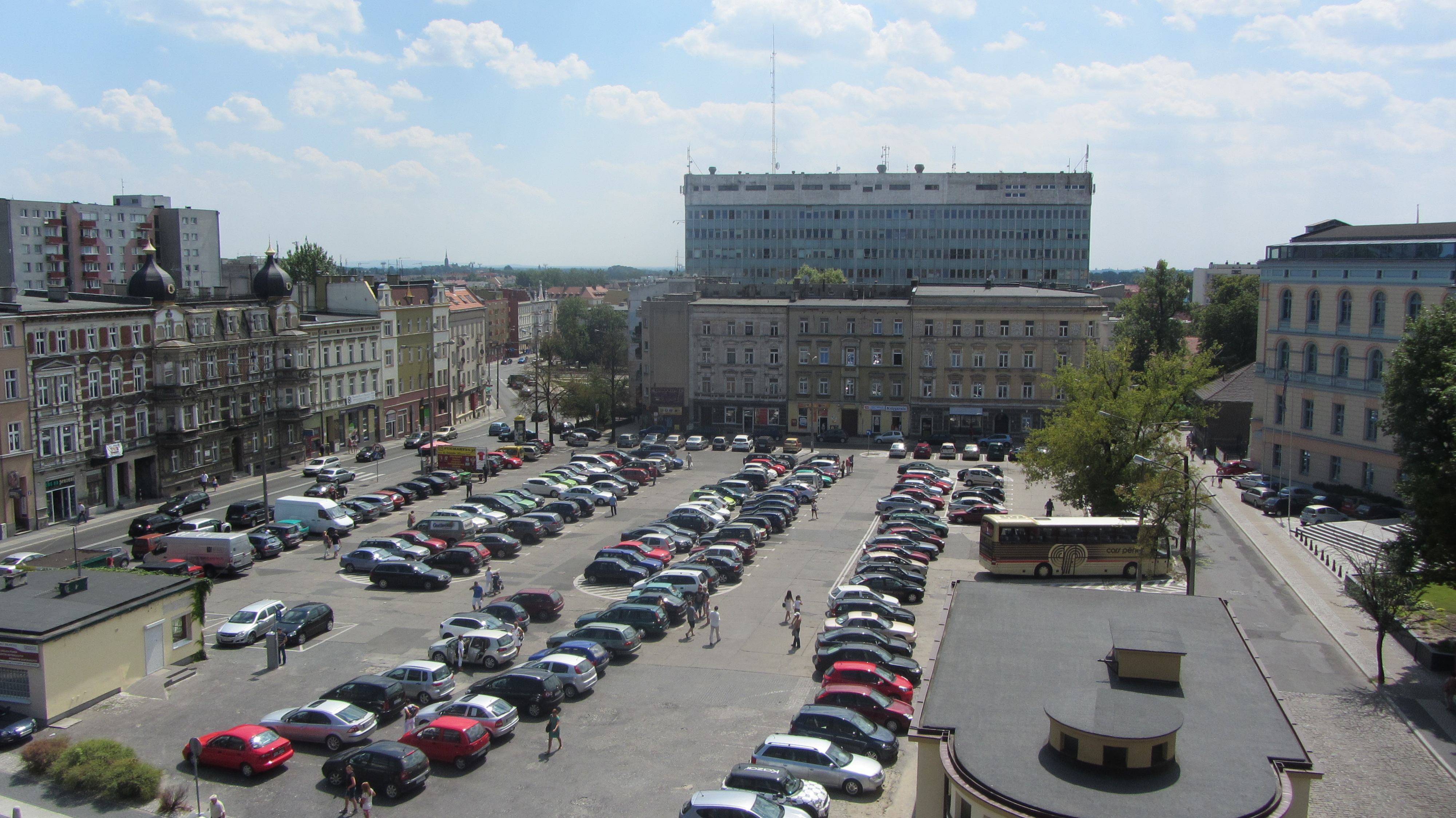 Kopernikus Platz in Oppeln